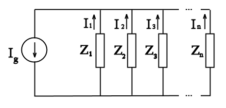 Esquema de un divisor de corriente